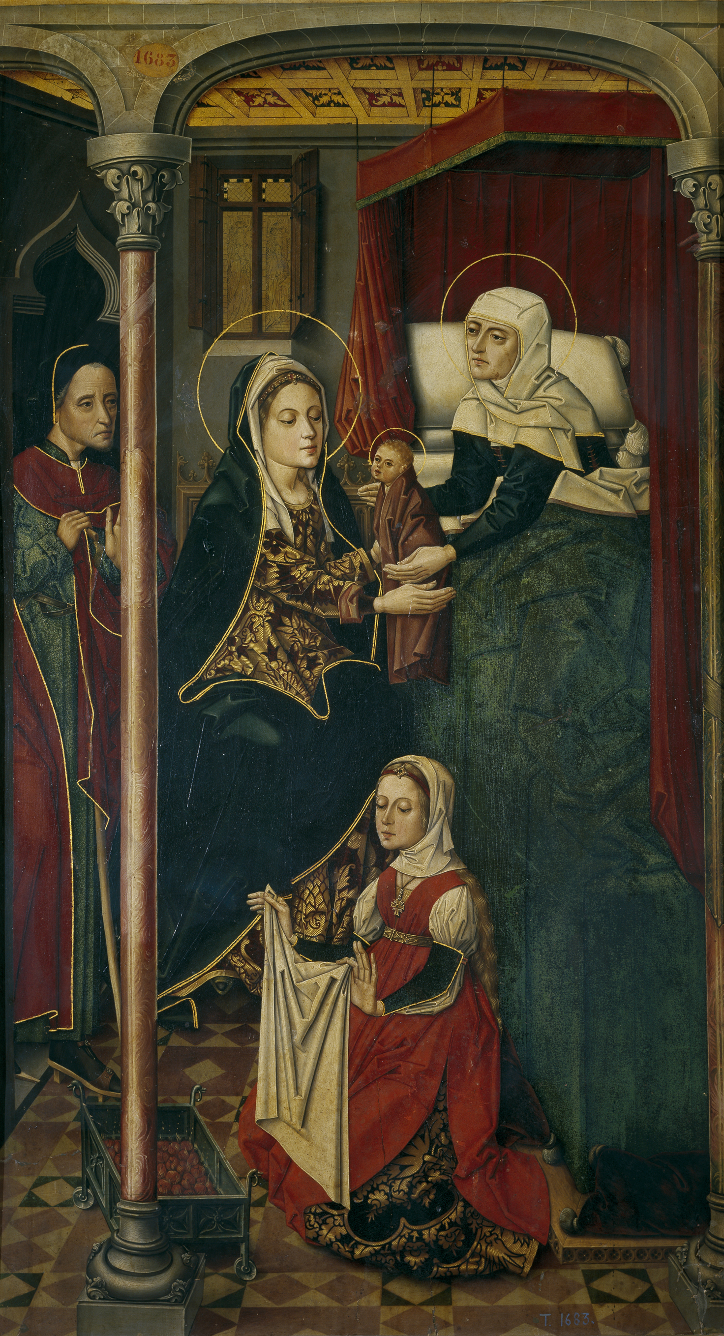 La obra representa el nacimiento del profeta San Juan Bautista, precursor del Mesías. La ventana del fondo tiene una vidriera con la Anunciación, tema alusivo a la encarnación de Cristo, del que el Bautista es precursor, y a la Virgen María, a la que Santa Isabel entrega al niño San Juan en presencia de Zacarías.